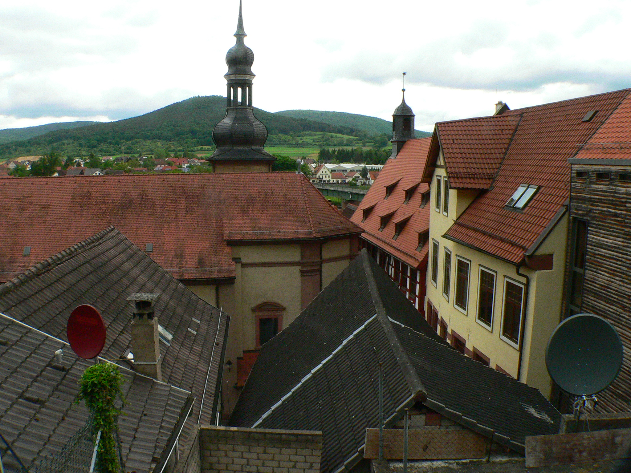 Freudenberg am Main, Gassen um die alte Pfarrkirche St, Laurentius